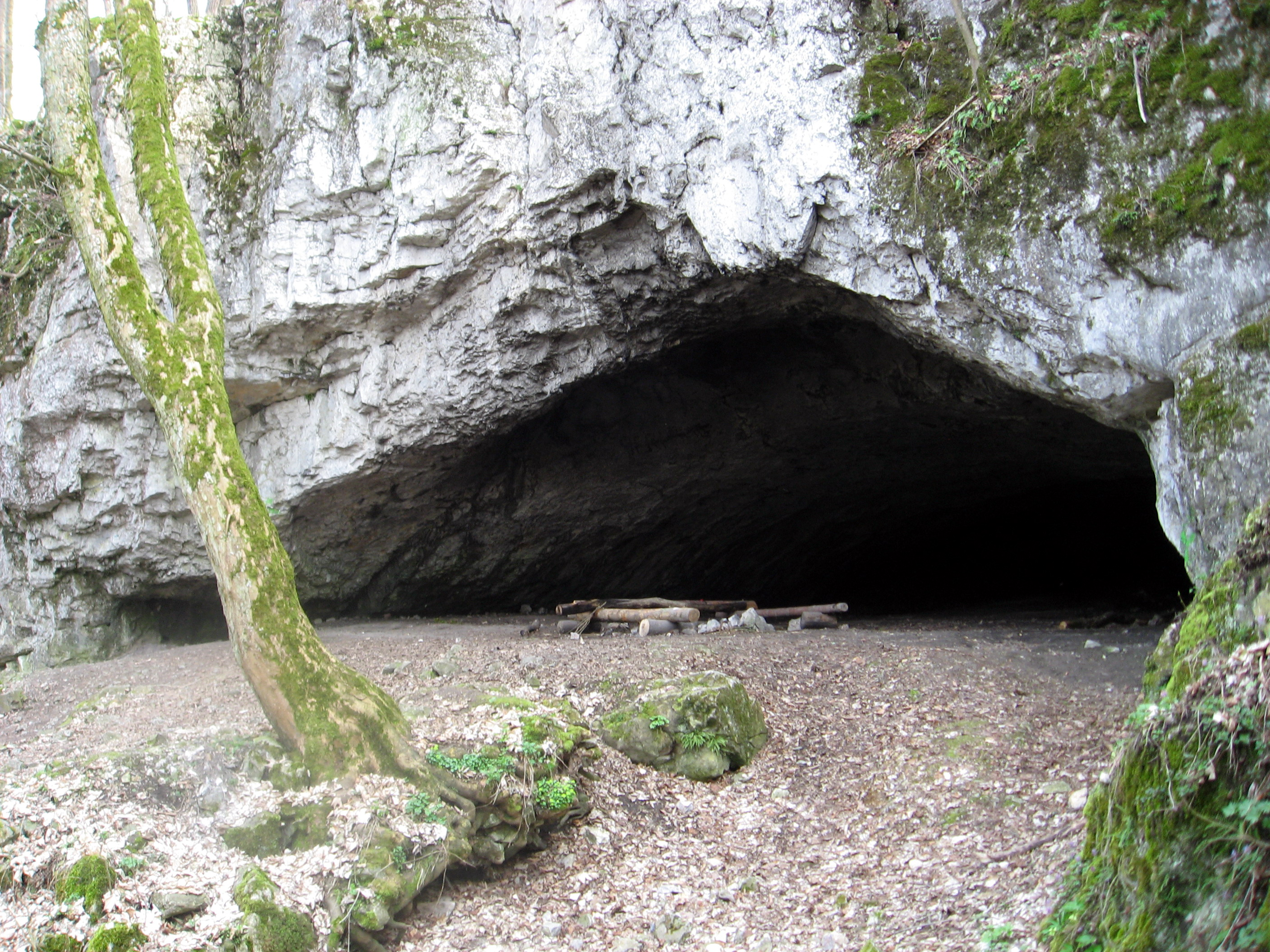 Jeskyně Pekárna